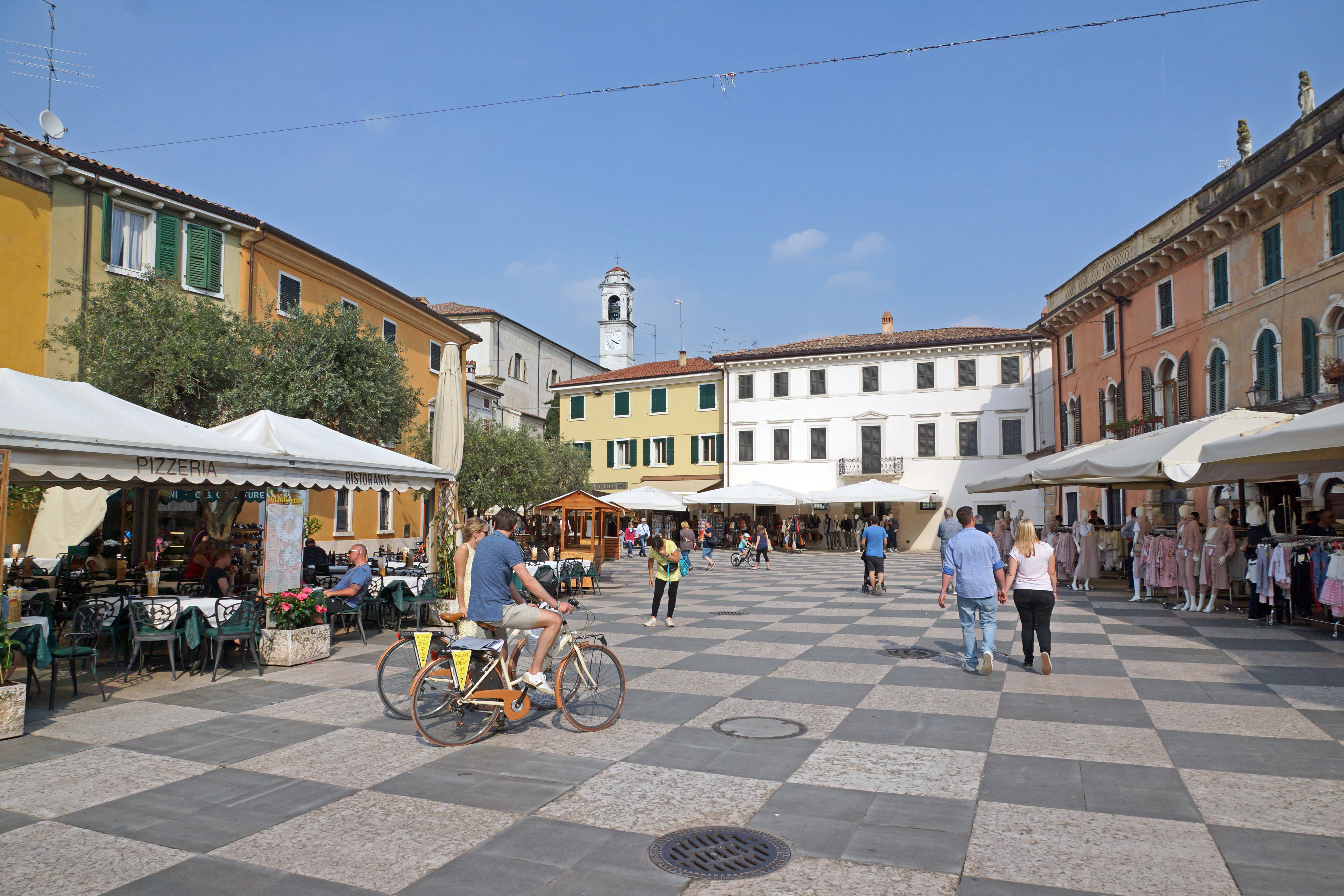 2017-04-10 04-14 Gardasee 251 Lazise